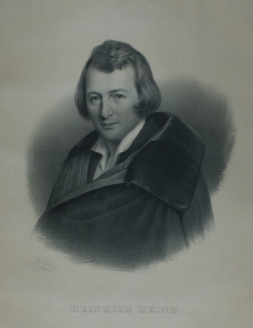 Heinrich Heine, Lithographie nach einer eigenen Ölskizze Gieres von 1838